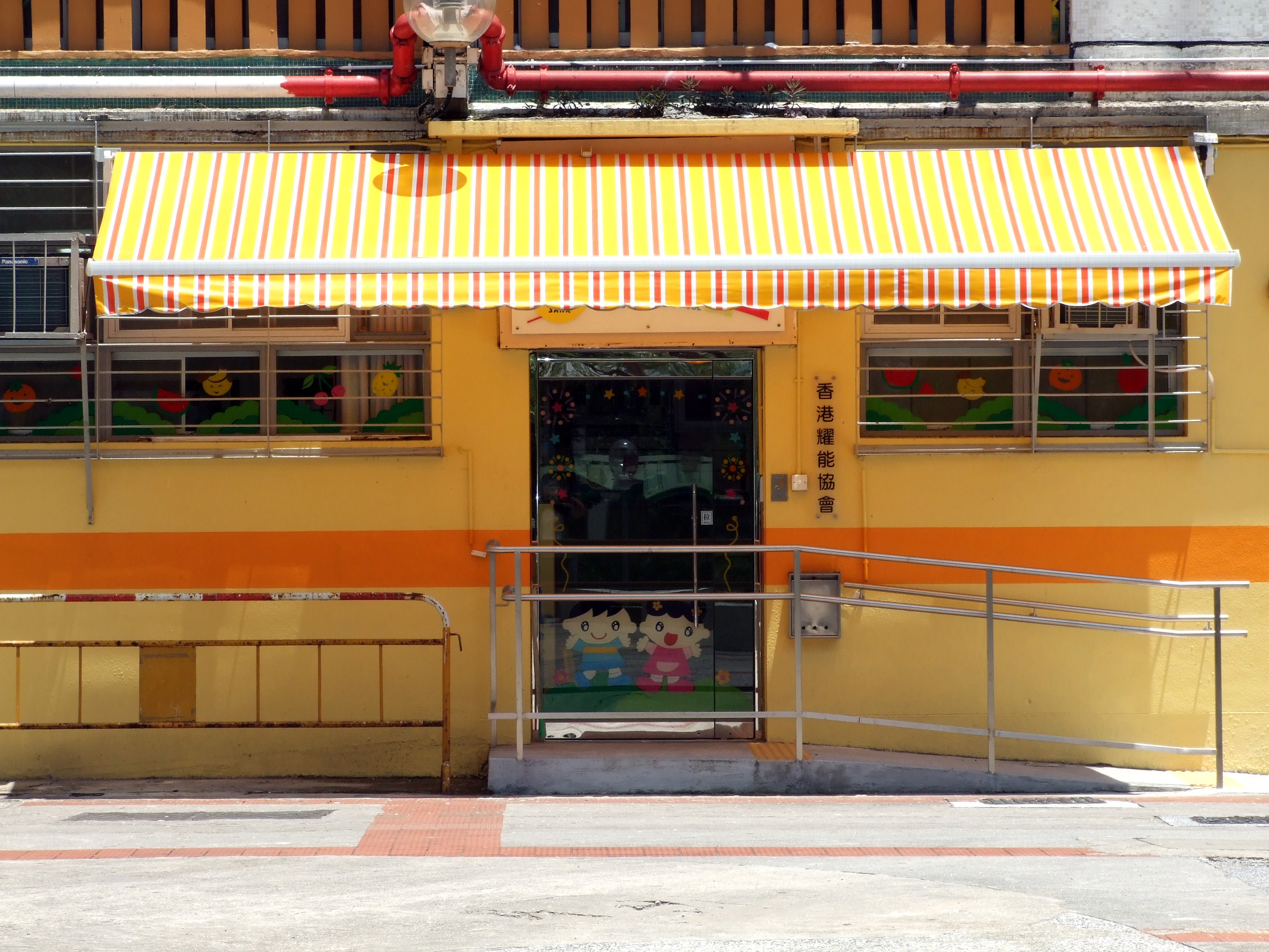 中文（香港）: 香港耀能協會隆亨幼兒中心